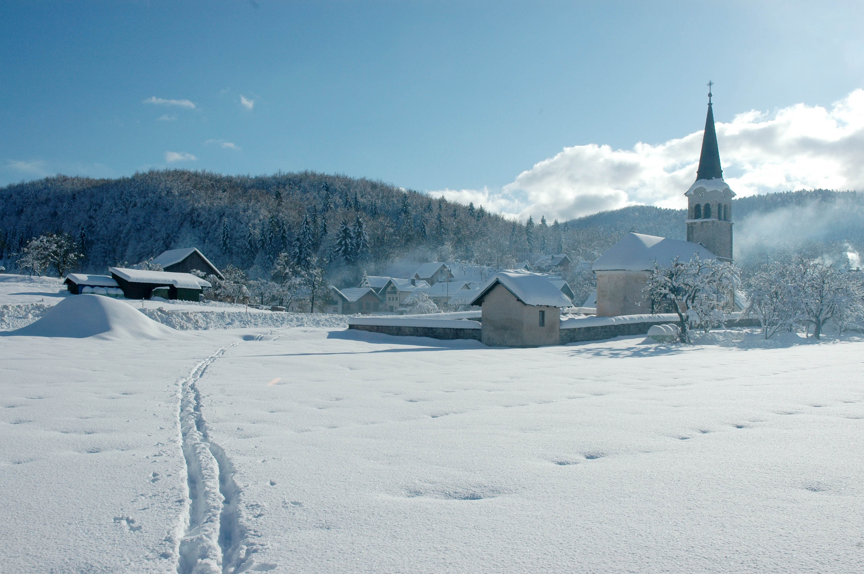 Babno Polje odeto v sneg